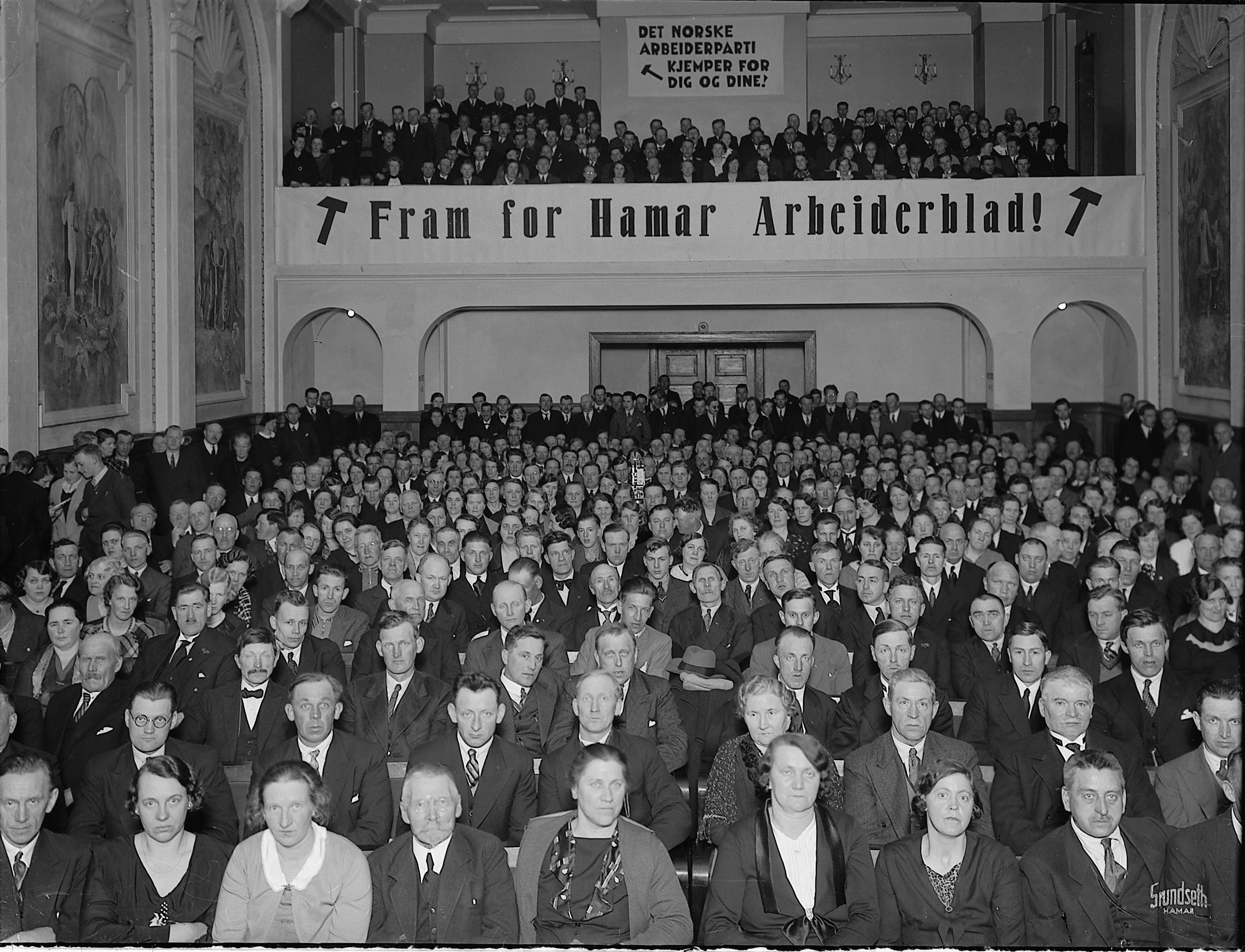 Hamar Arbeiderblad 10-års jubileum i Festiviteten i 1935. Partiformann i Arbeiderpartiet Oscar Torp og statsråd Fredrik Monsen holdt festtalene. Det ble vist film om arbeiderbevegelsens fremmarsj der en del av opptakene ble gjort i Hamar Arbeiderblads lokaler.